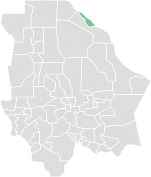 Mapa del municipio de Praxedis G. Guerrero en estado mexicano de Chihuahua